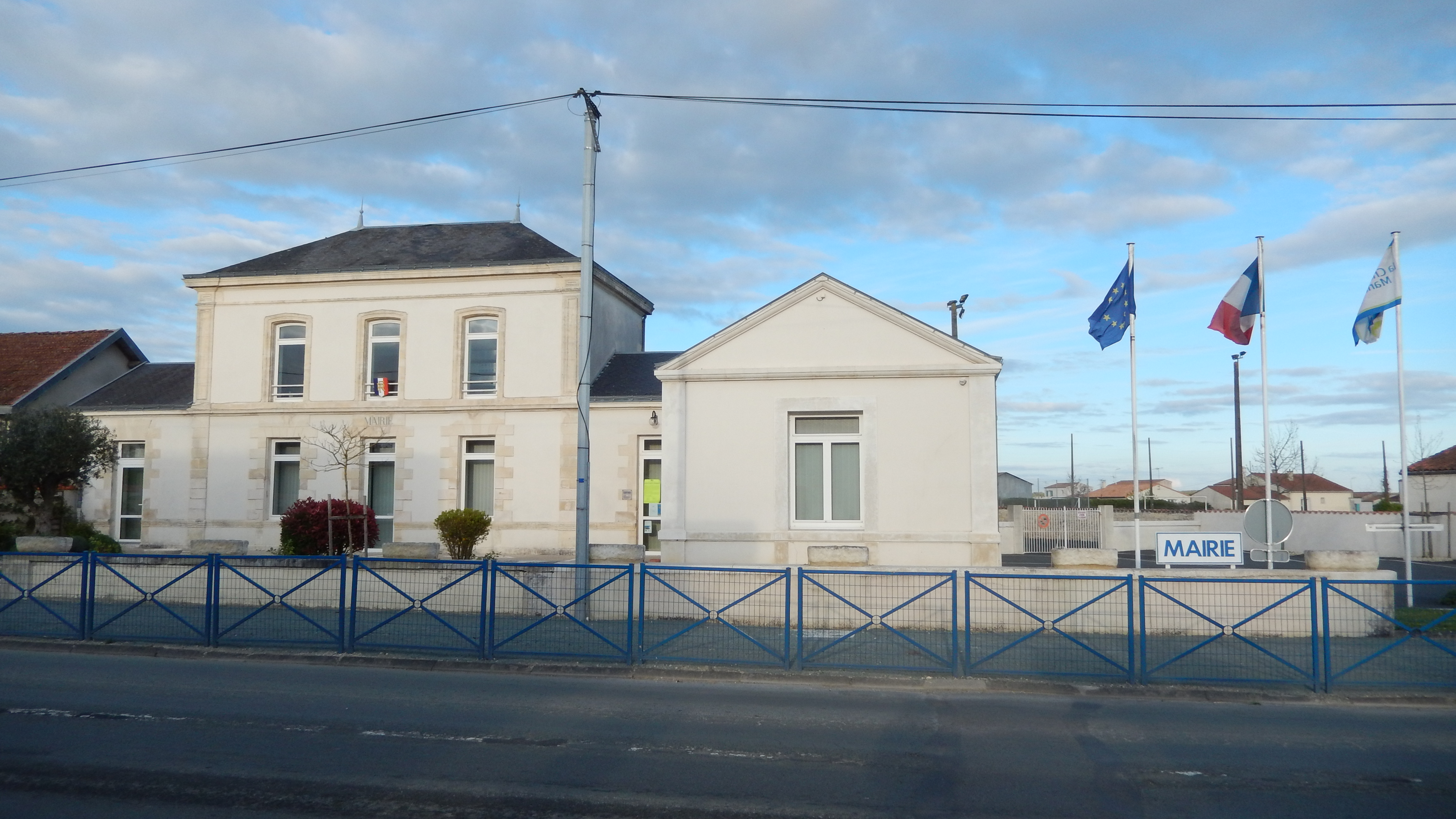 La mairie de Villeneuve-la-Comtesse (Charente-Maritime, France).